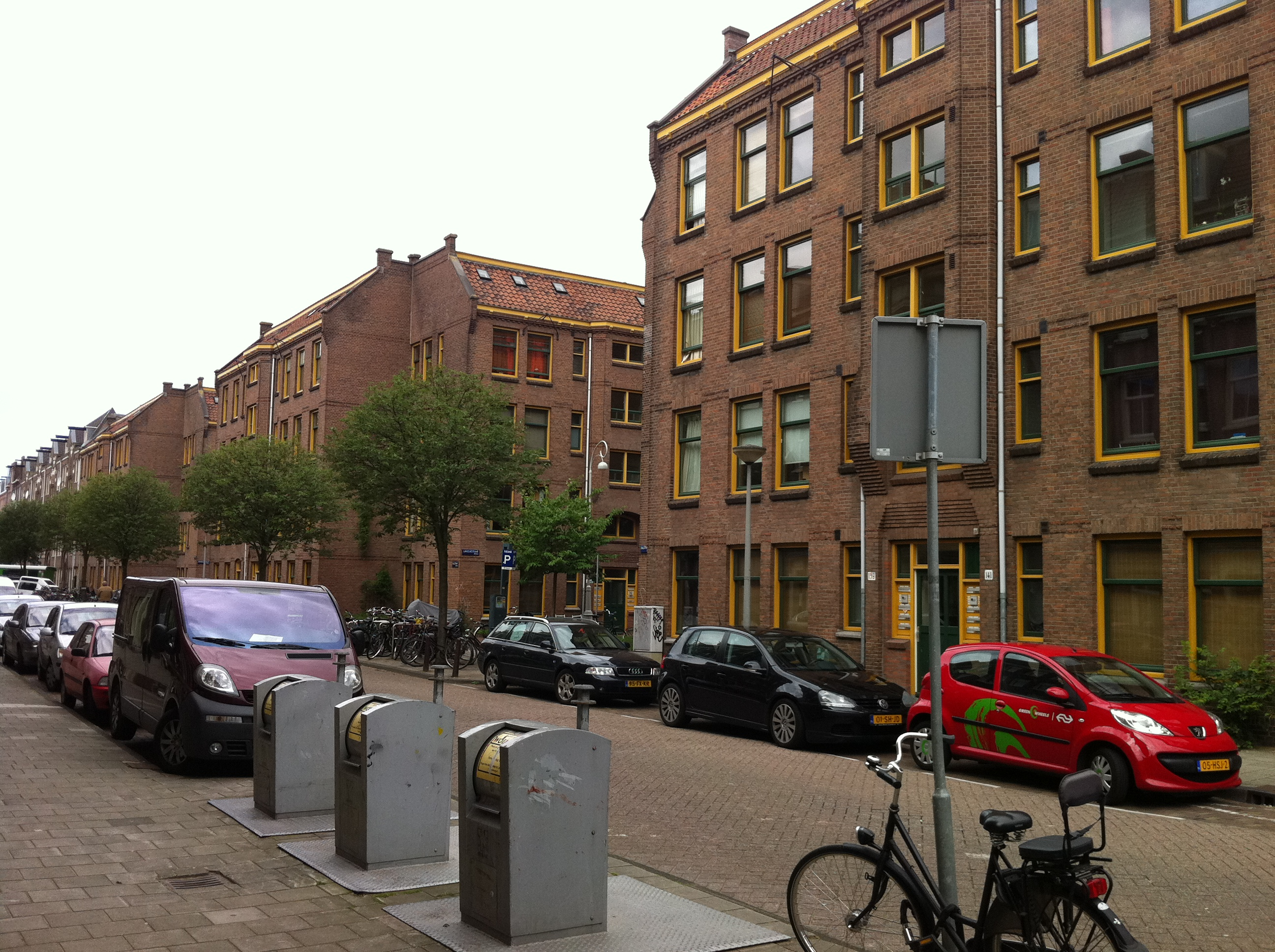 Berlageblokken aan de zijde van Javastraat